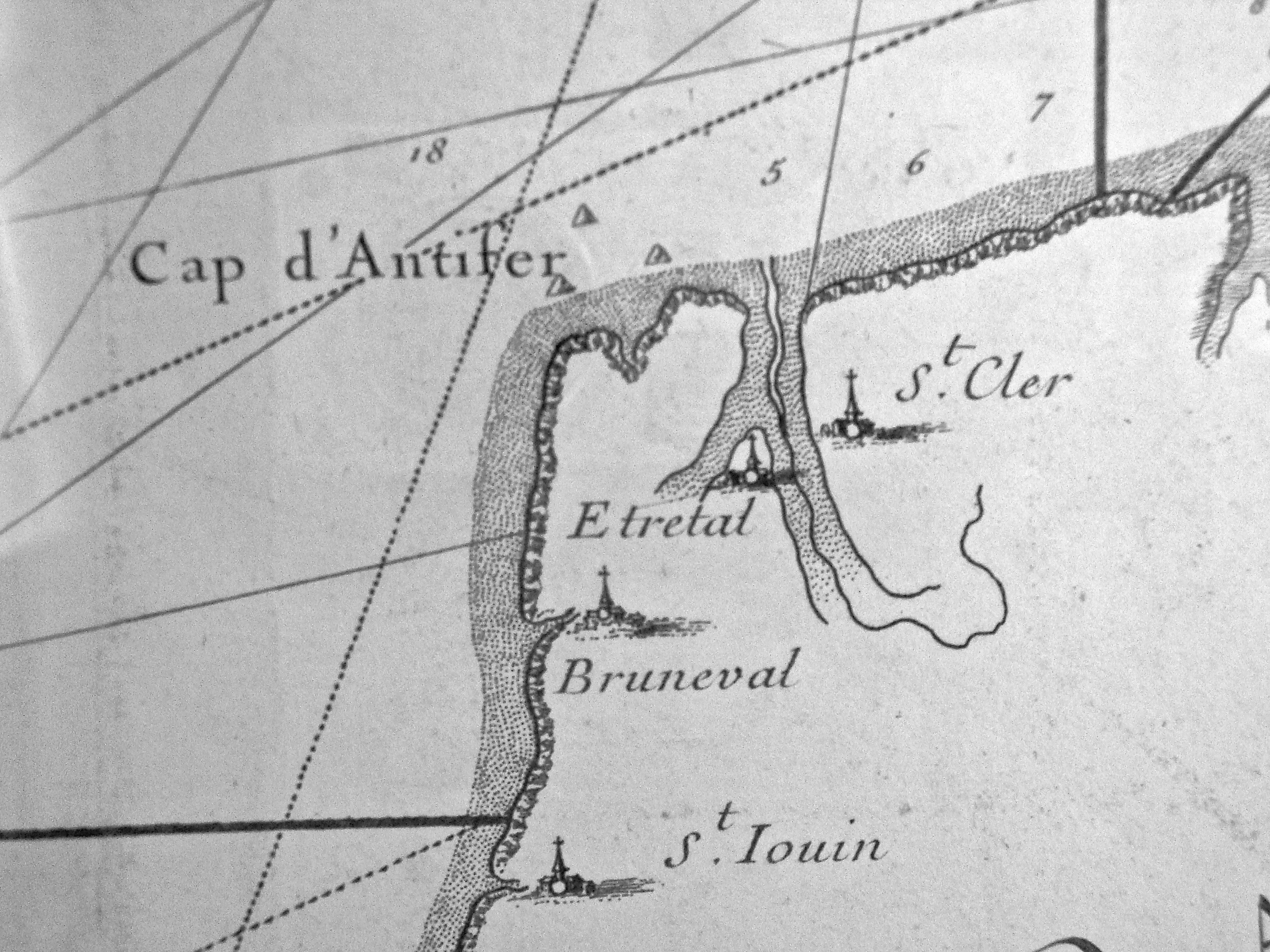 Gros plan sur l'estuaire d'Etretat dans " 1 - Carte particulière des Costes de Normandie", depuis Dieppe jusqu'à la pointe de la Percée en Bessin (en toises et lieues communes) - Musée Maison de l'Armateur- Le Havre.